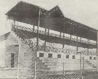 Estadio viejo de Rosario Central en la década del 20.